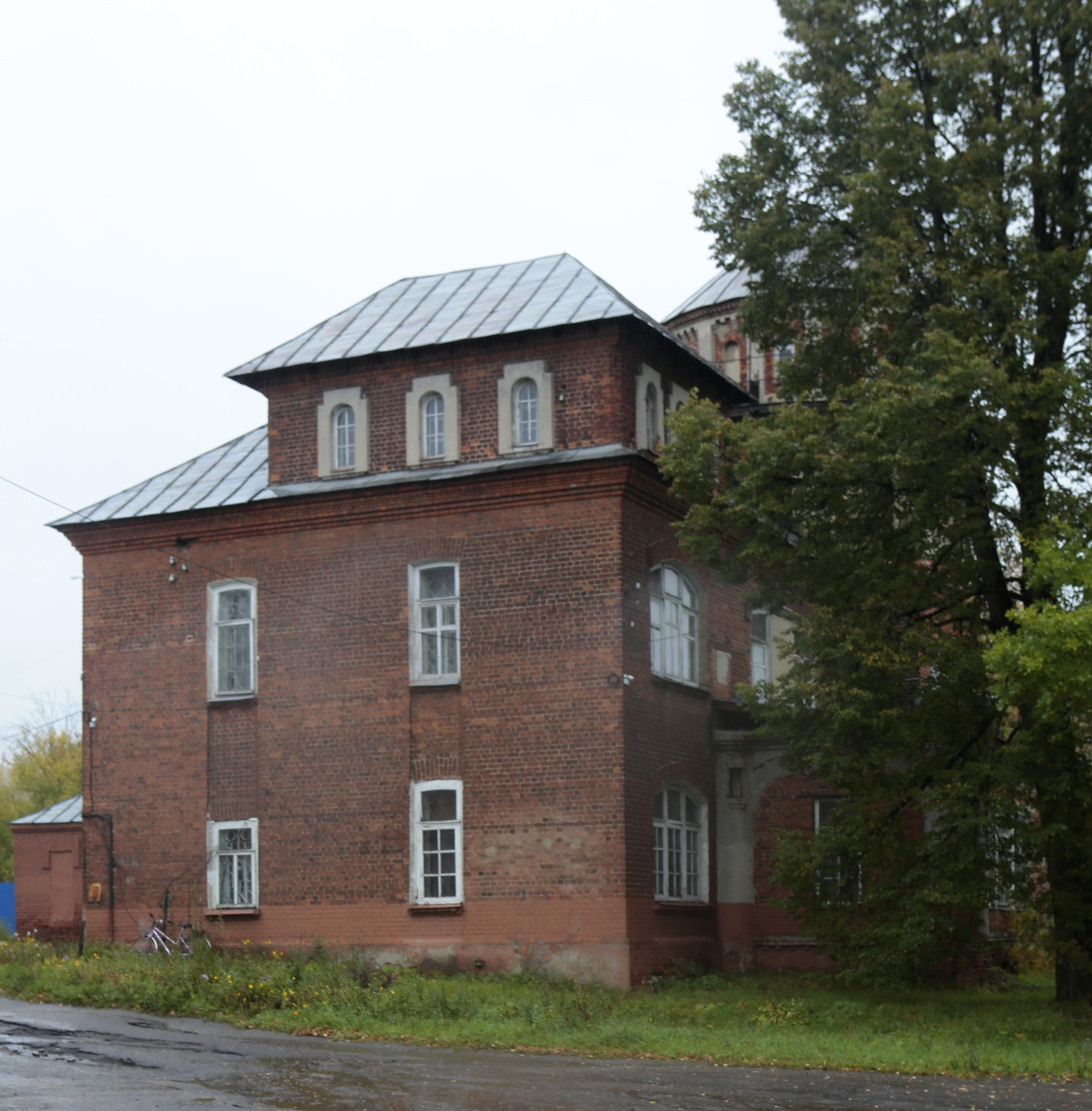 с 1986 г. здесь располагается Заволжский художественно-краеведческий музей